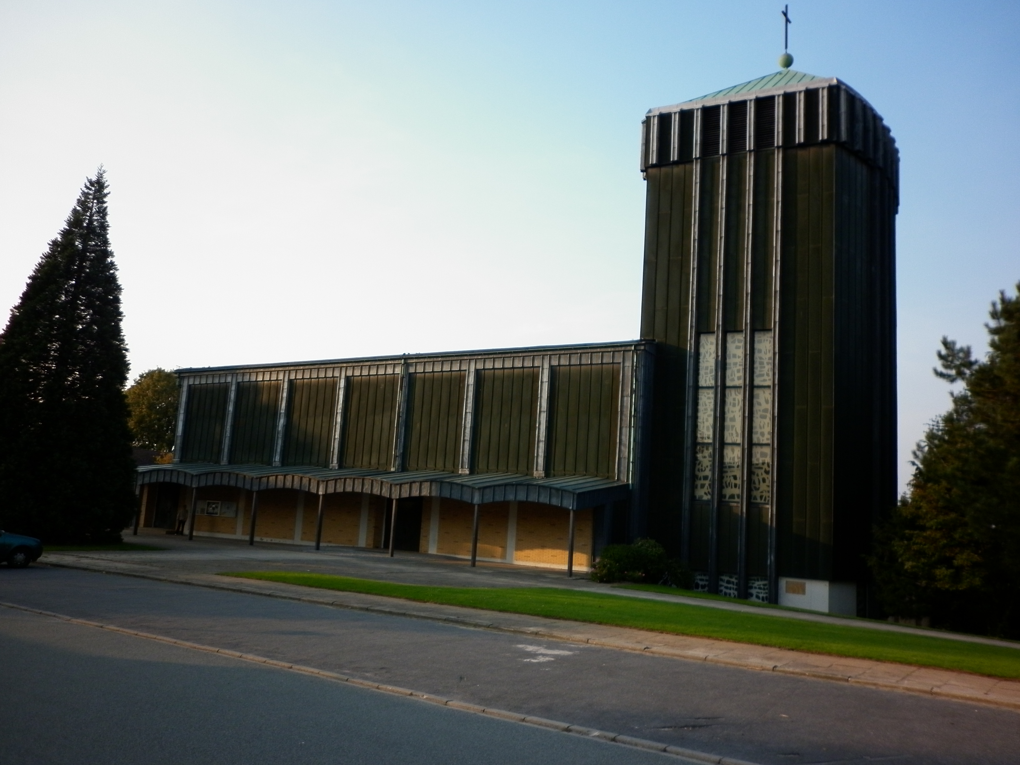 Katholische Kirche, heute auch Kolumbariumskirche, in der Overbergstraße in Georgsmarienhütte. Gehört zur Pfarreiengemeinschaft Georgsmarienhütte-Ost. Südansicht.